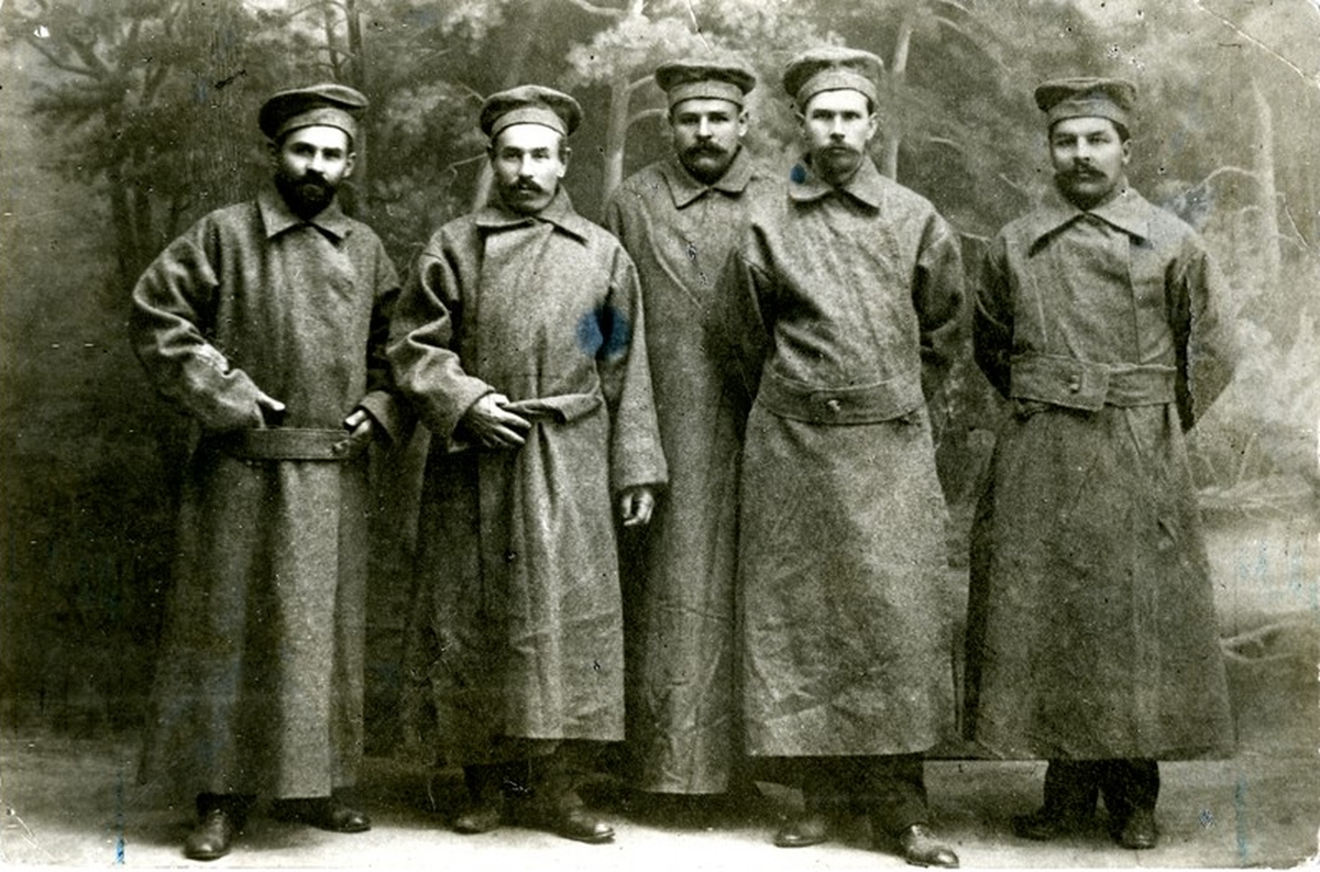 Большевики-депутаты IV Государственной Думы освобождённые из каторжной тюрьмы в одежде каторжан. Слева направо: Г. И. Петровский, М. К. Муранов, А. Е. Бадаев, Ф. Н. Самойлов, Н. Р. Шагов .